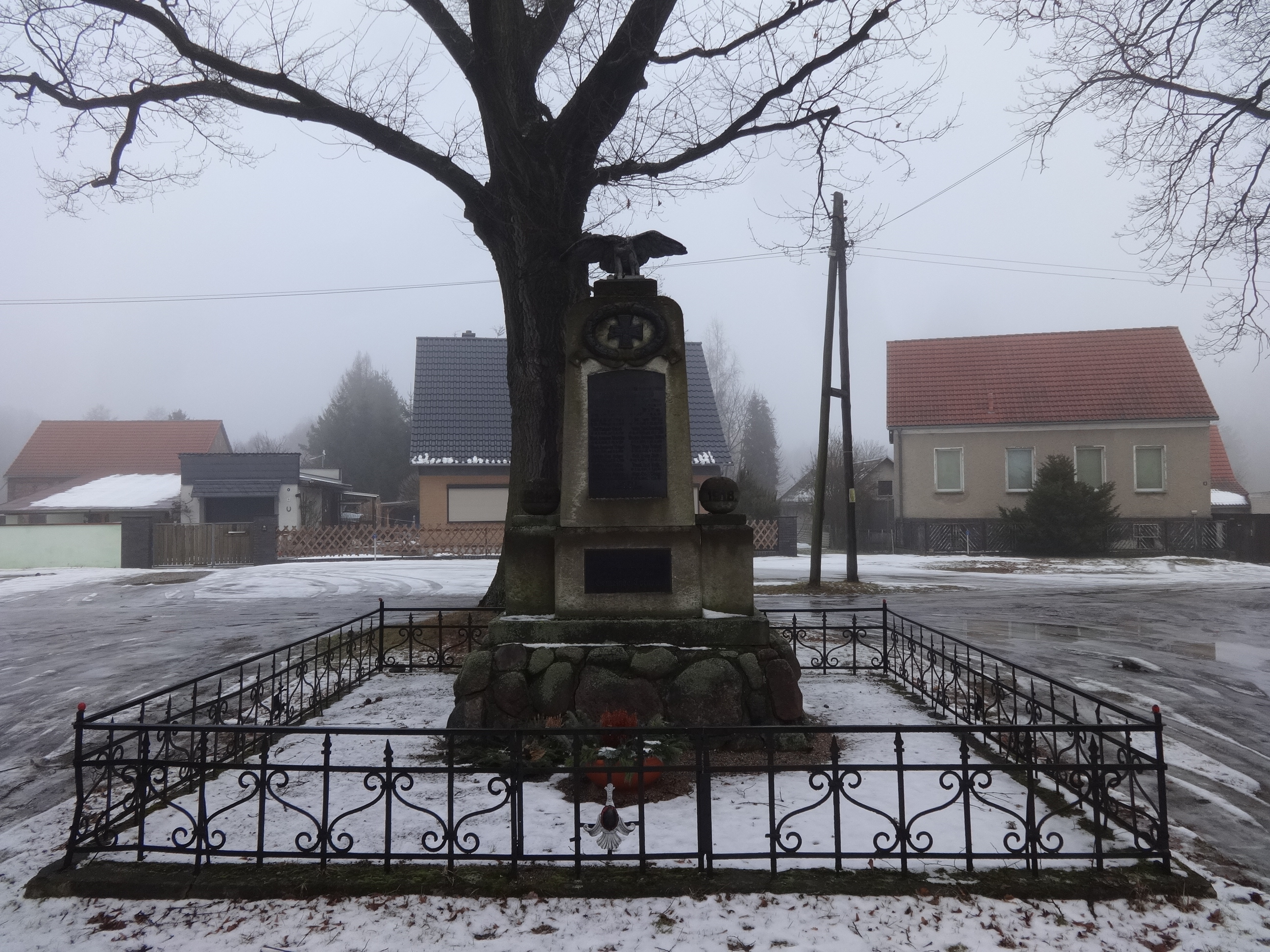 Tornow, ein Ortsteil der Stadt Teupitz im Landkreis Dahme-Spreewald in Brandenburg